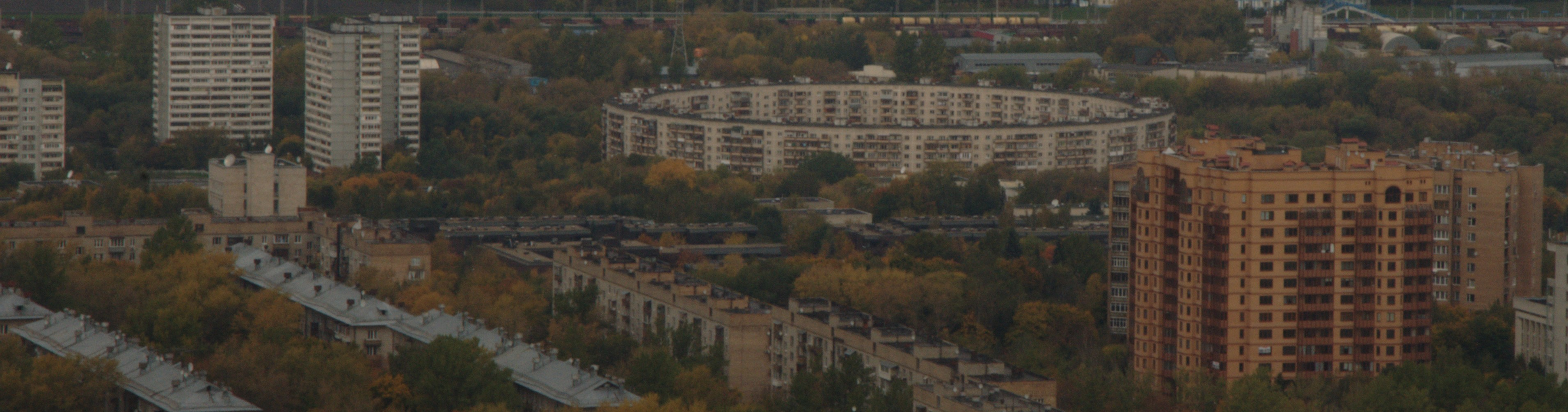 Вид со смотровой площадки МГУ на улицу Довженко.